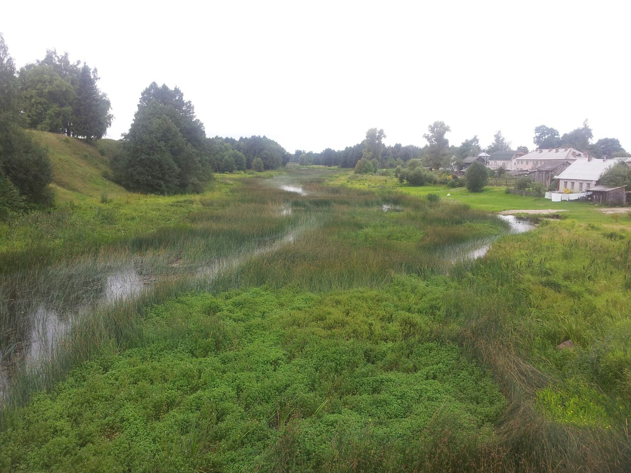 Река Синяя в Красногородске. Вид на север с моста ул. Советской. Слева видны валы городища.